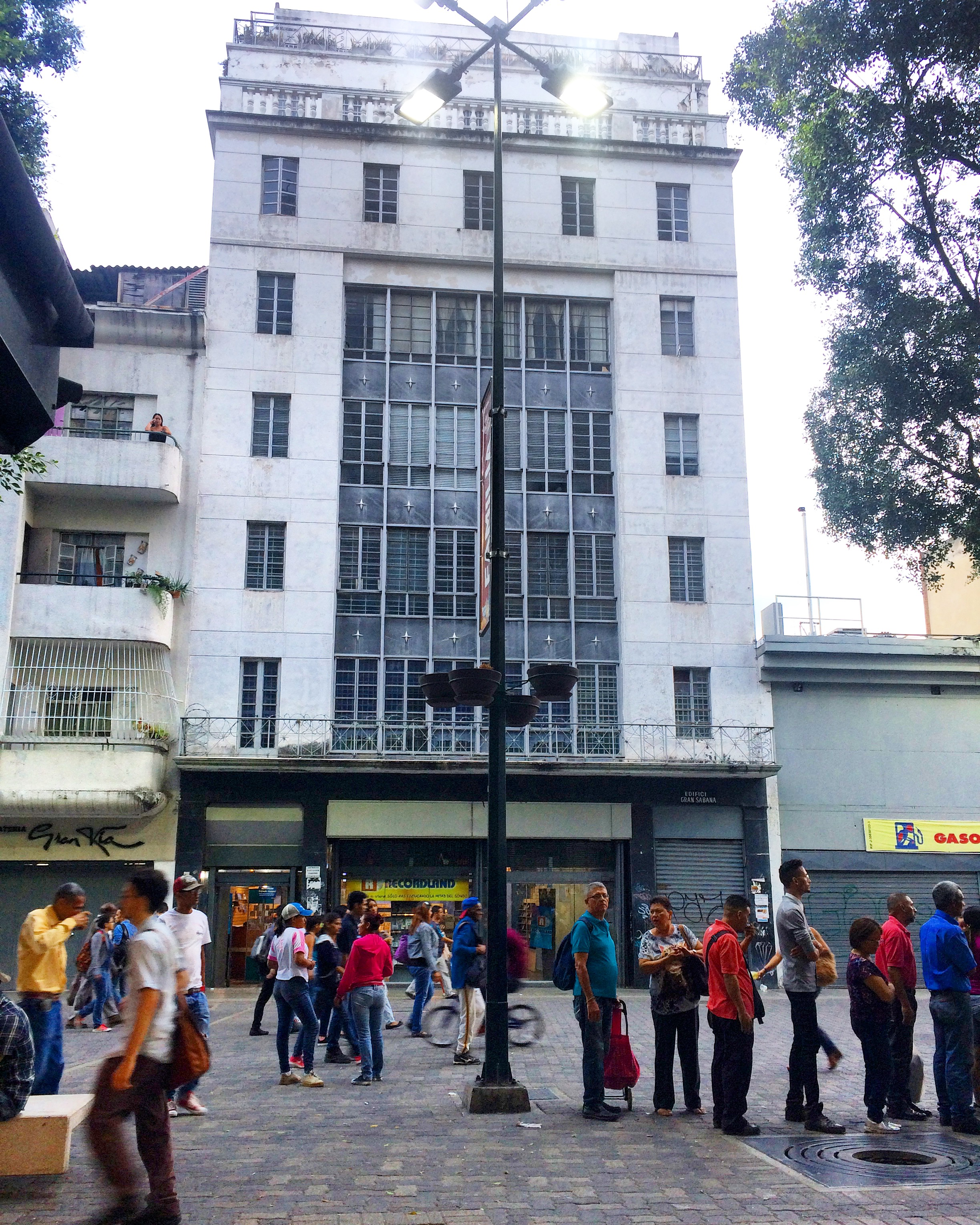 Aquí se ubica el museo ornitológico William Phelps, el más importante de América Latina. Sabana Grande Caracas Shopping Sabana Grande Caracas Museums Sabana Grande Caracas art Sabana Grande Caracas tiendas